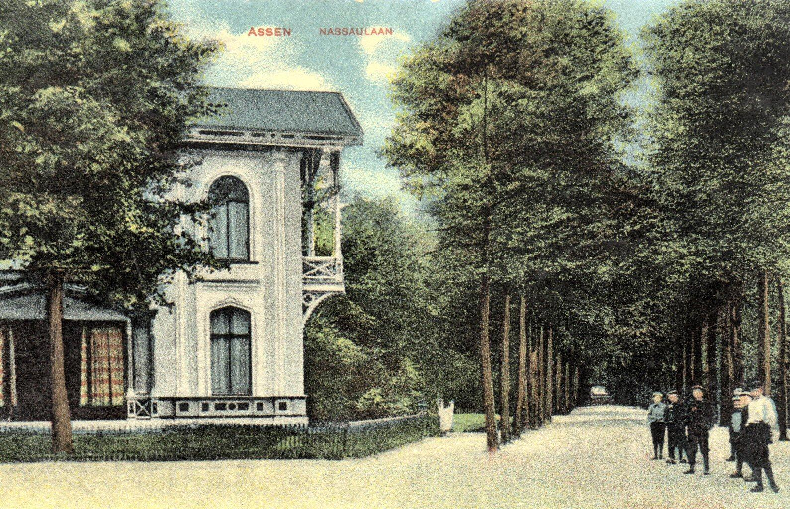 De Dr. Nassaulaan in Assen rond 1905